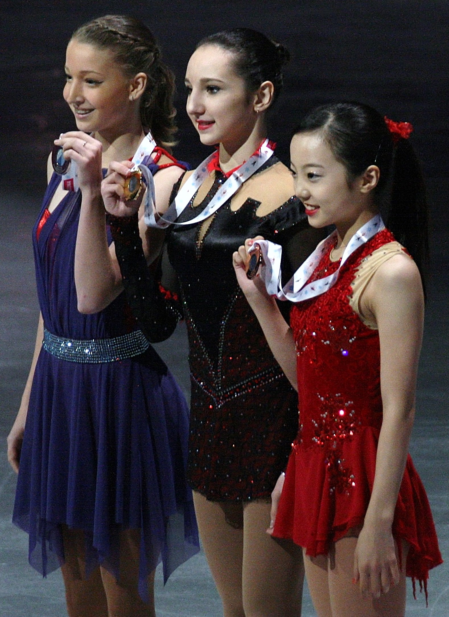 Церемония награждения девушек (юниоры) на Финале Гран-при по фигурному катанию 2015-2016. Слева на право: Мария Сотскова (Россия) - 2е место, Полина Цурская (Россия) - 1е место, Марин Хонда (Япония) - 3е место.